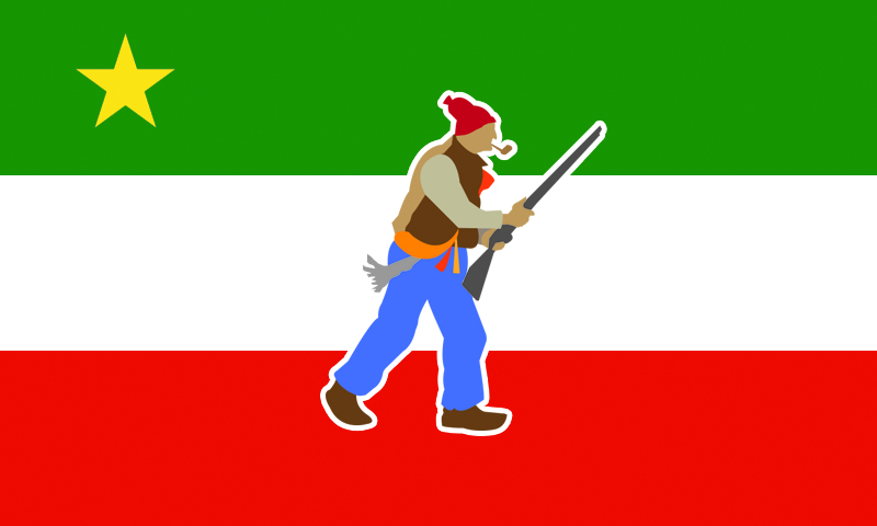 Drapeau des Patriotes, avec Patriote et étoile.